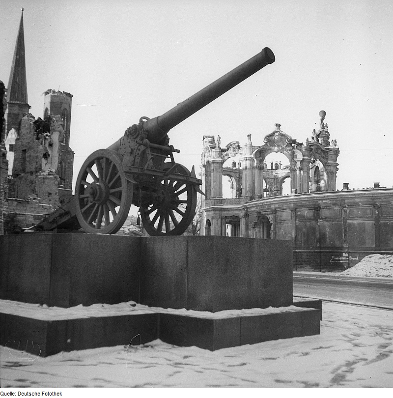 Original image description from the Deutsche FotothekSockel des entfernten Wettinobelisken mit Geschütz unbekannter Herkunft. Im Hintergrund Ruinen der Sophienkirche und des Zwingers; [Zur Zeit liegen keine gesicherten Erkenntnisse vor, wann und warum das Geschütz auf den Sockel gehoben und wann es entfernt worden ist. Widersprüchlichen Angaben von Zeitzeugen zufolge ist es wohl französischer Herkunft, nach dem Krieg gegen Frankreich 1940 aufgestellt und erst etwa 1950 entfernt worden]